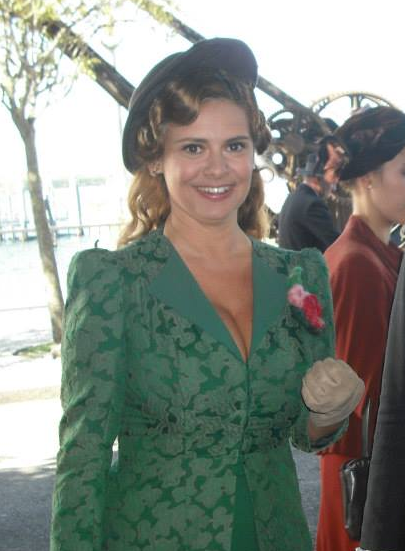 l'attrice Debora Caprioglio nell'agosto 2013 sul set del film "Il pretore" di Giulio Base.